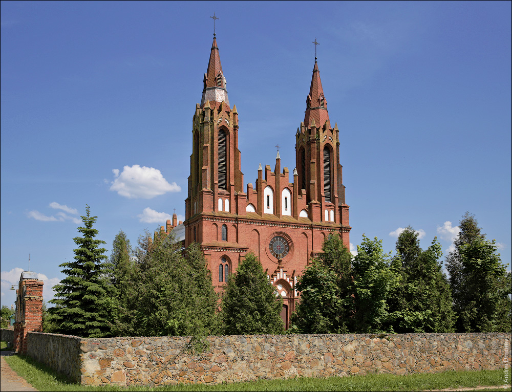 Рэпля. Касцёл